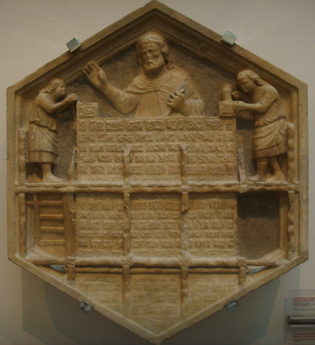 Formella 09, armatura, l'arte del costruire, collaboratore di andrea pisano (maestro dell'armatura), 1334-1336